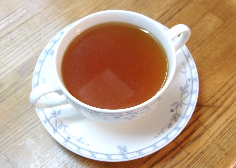 self-made consommé de volaille (double consomme soup with chicken)